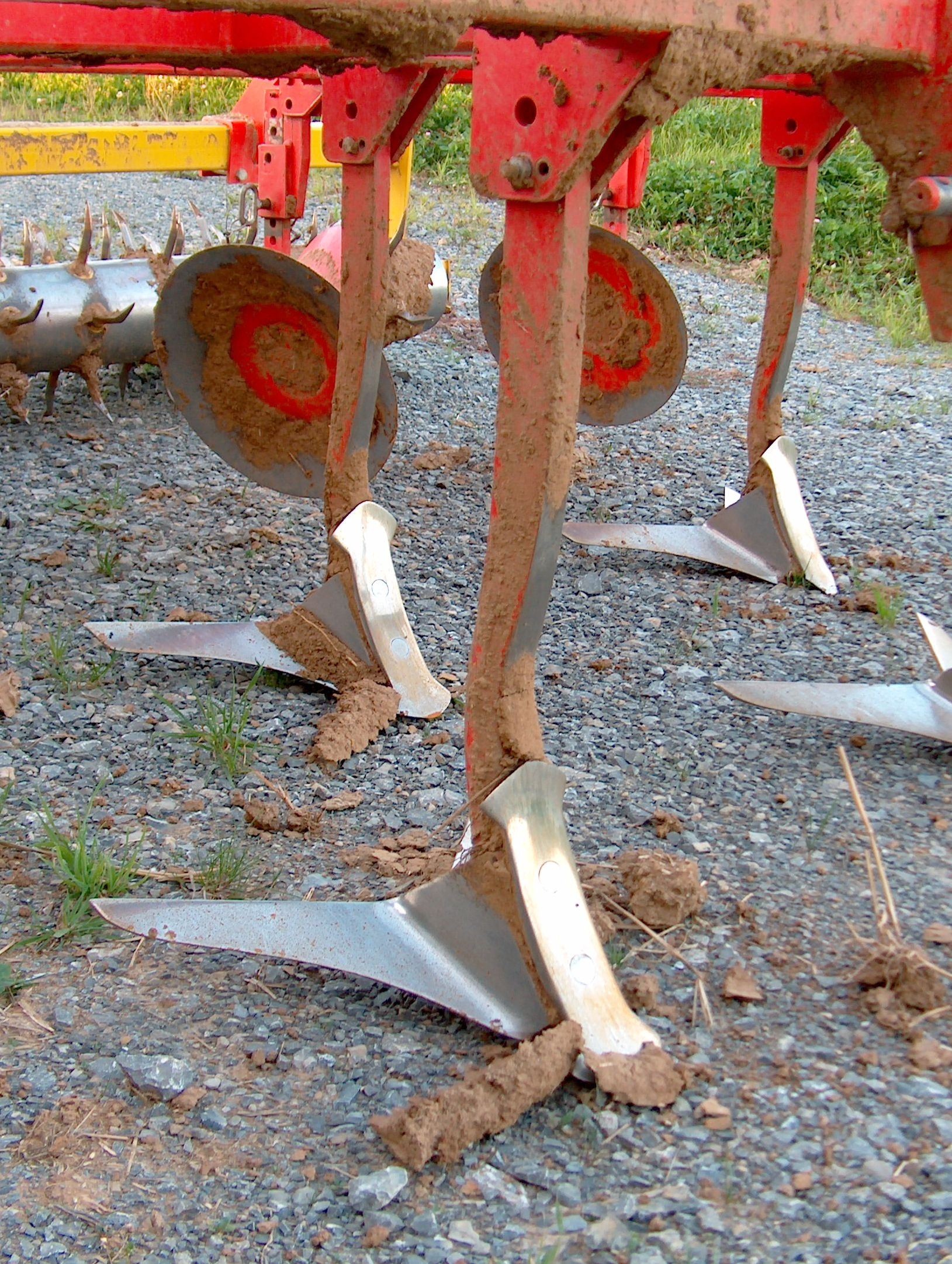 Flügelschar (Doppelherzschar mit Flügeln) eines Pöttinger-Grubbers Synkro 2600